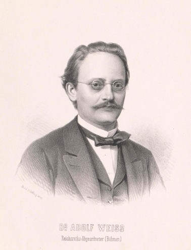 Adolf Weiß von Tessbach (1831 - 1900), Rakouský a český šlechtic a politik.